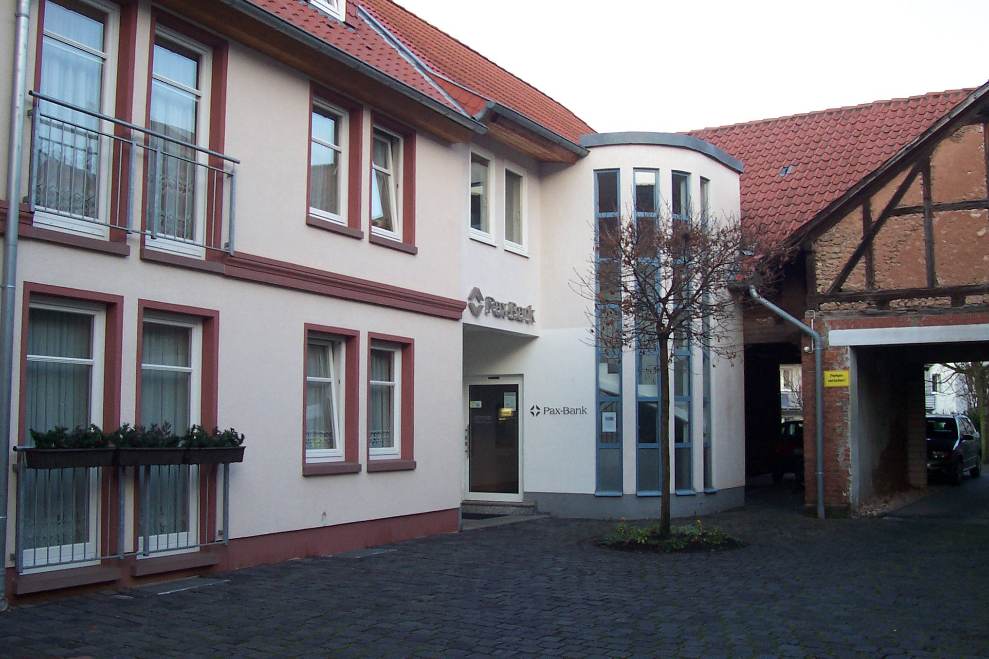 Geschäftsstelle der Pax-Bank eG, Lindenallee 37, 37308 Heilbad Heiligenstadt, Deutschland